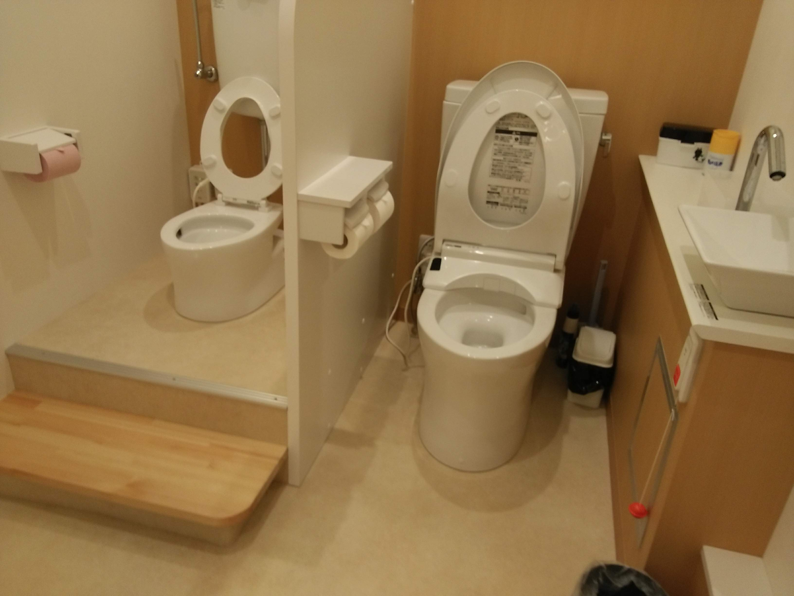 Toilet pintar Jepang